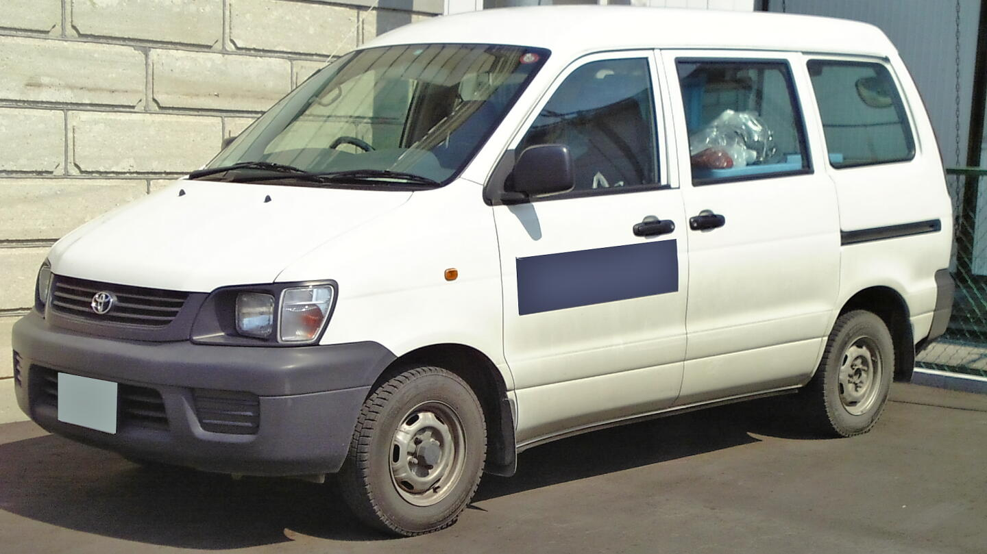 トヨタ・ライトエースバン（5代目）